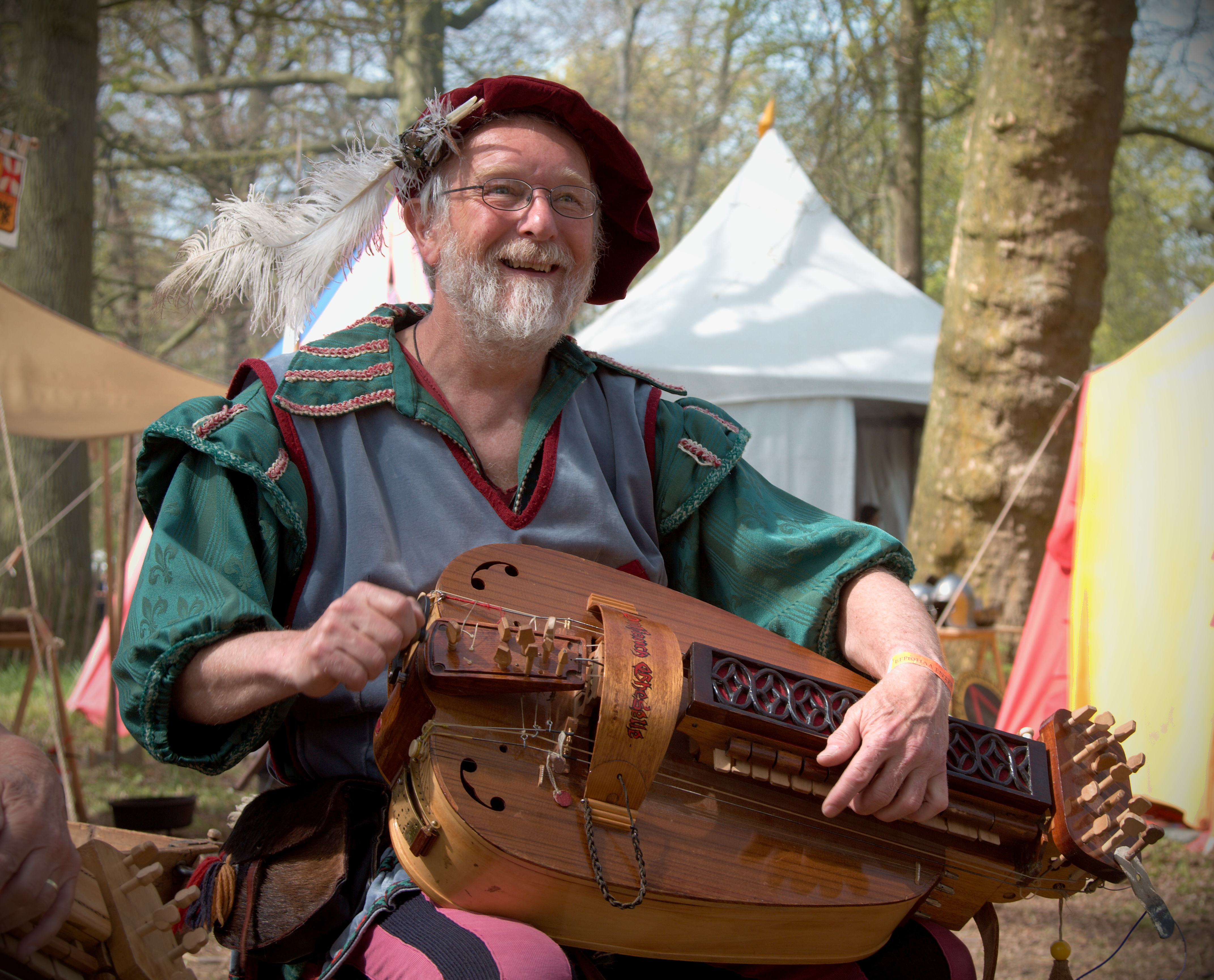 Sweeeeet music